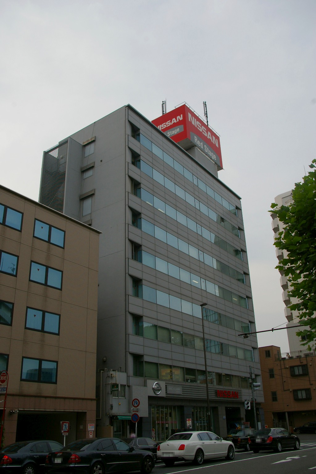 2009.4東京都港区で塾生 (talk)が撮影。